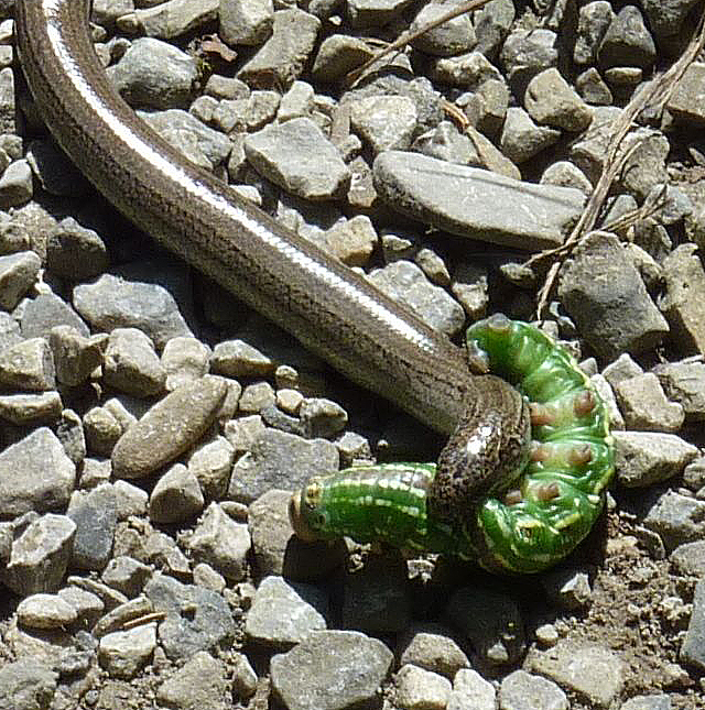 Blindschleiche hat eine Raupe gepackt